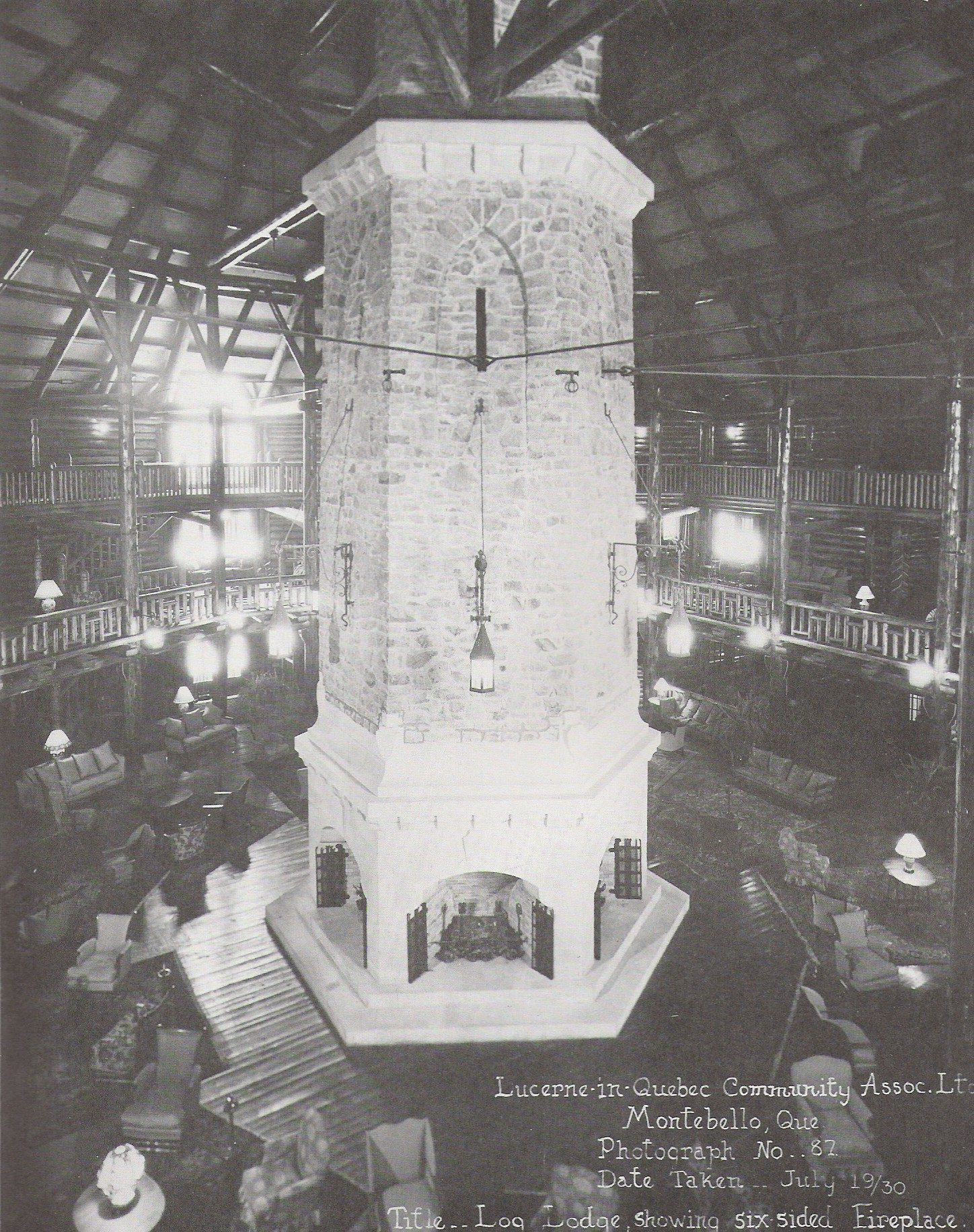 Chateau Montebello, Quebec, Canada.